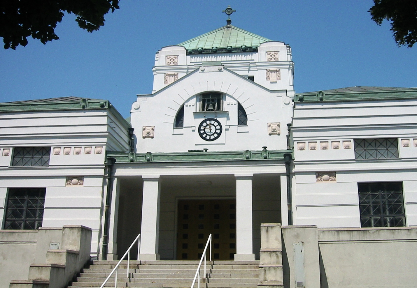 Wiener Zentralfriedhof, Aufbahrungshalle